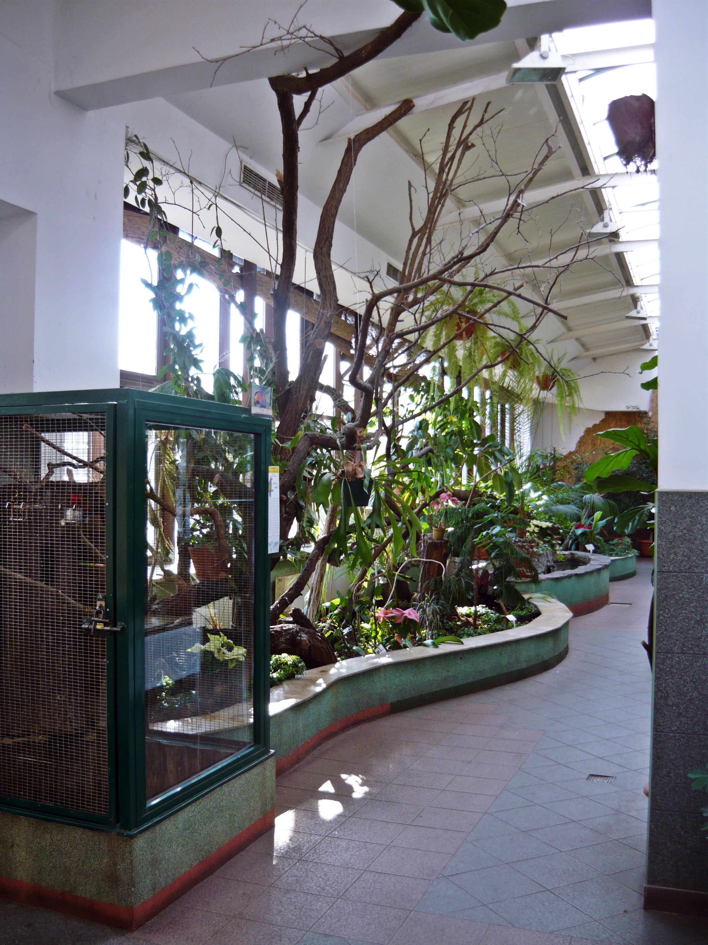 wnętrze ptaszarni w zoo toruń